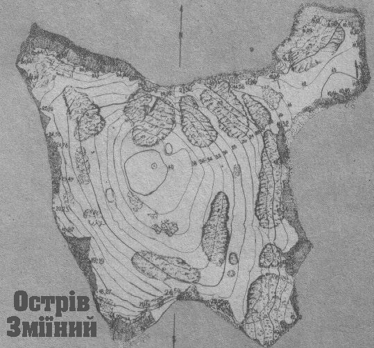 Рельєфна карта острова Зміїний